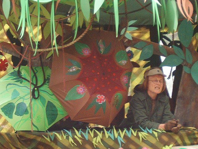 Das Frankfurter Figurentheater mit Marieluise Ritter bei einer Aufführung im Kindergarten des HR Am Steinernen Stock, im Juli 2005 anlässlich eines Sommerfestes mit dem Stück Sei ein faules Ai - Im Regenwald ist manches faul....